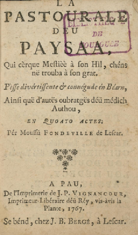 Libre de Joan Enric de Fondevila, escrivan bearnes